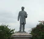 Benjamin Aceval